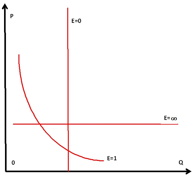 Эластичность спроса (Гальперин В. М., Игнатьев С. М., Моргунов В. И. Микроэкономика. В 3 томах. — СПб.: Омега-Л, Экономикус, 2010. — Т. 1. — 1026 с. — ISBN 978-5-370-01549-6)